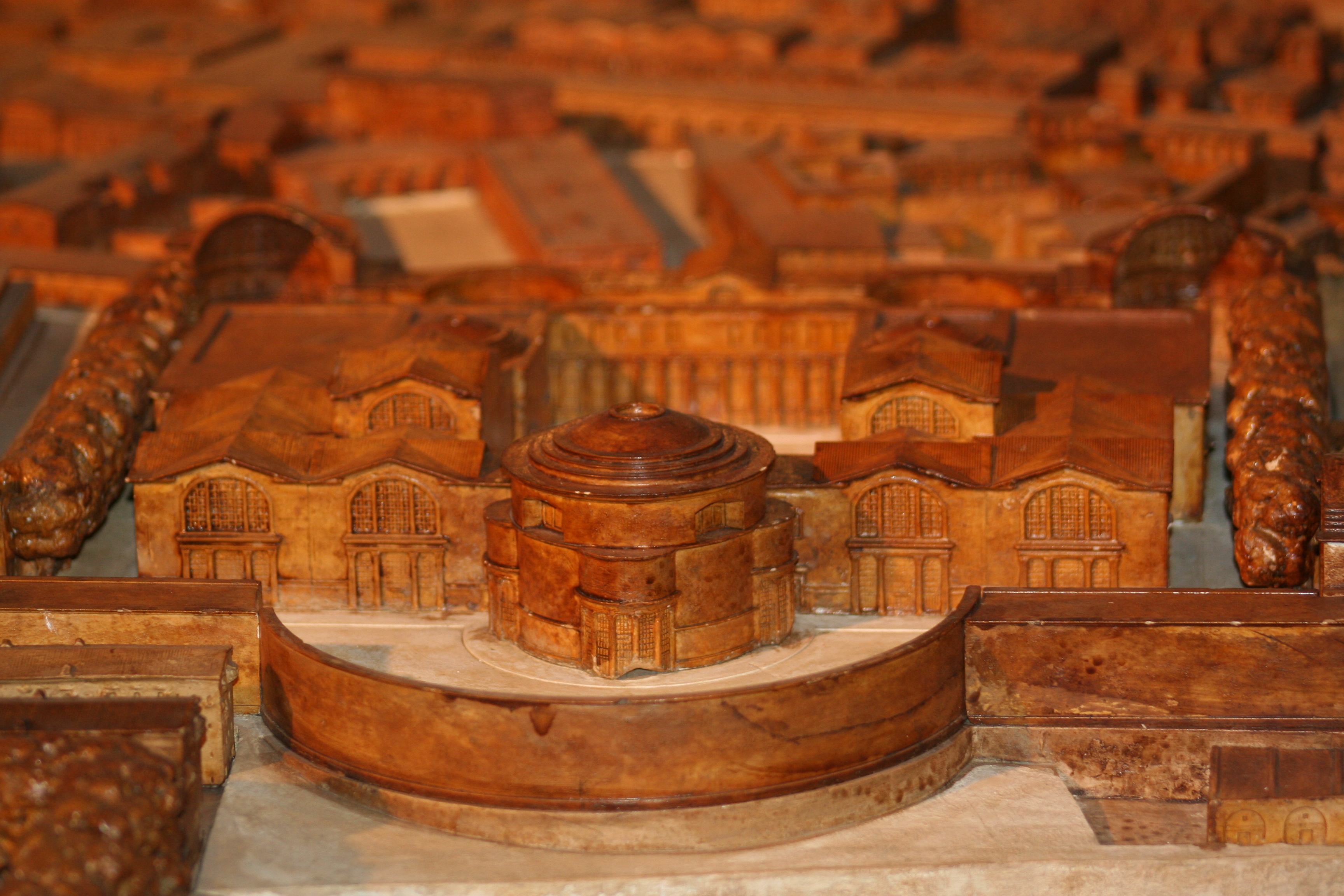 Thermes de Decius, plan de Rome Paul Bigot, MRSH universite de Caen